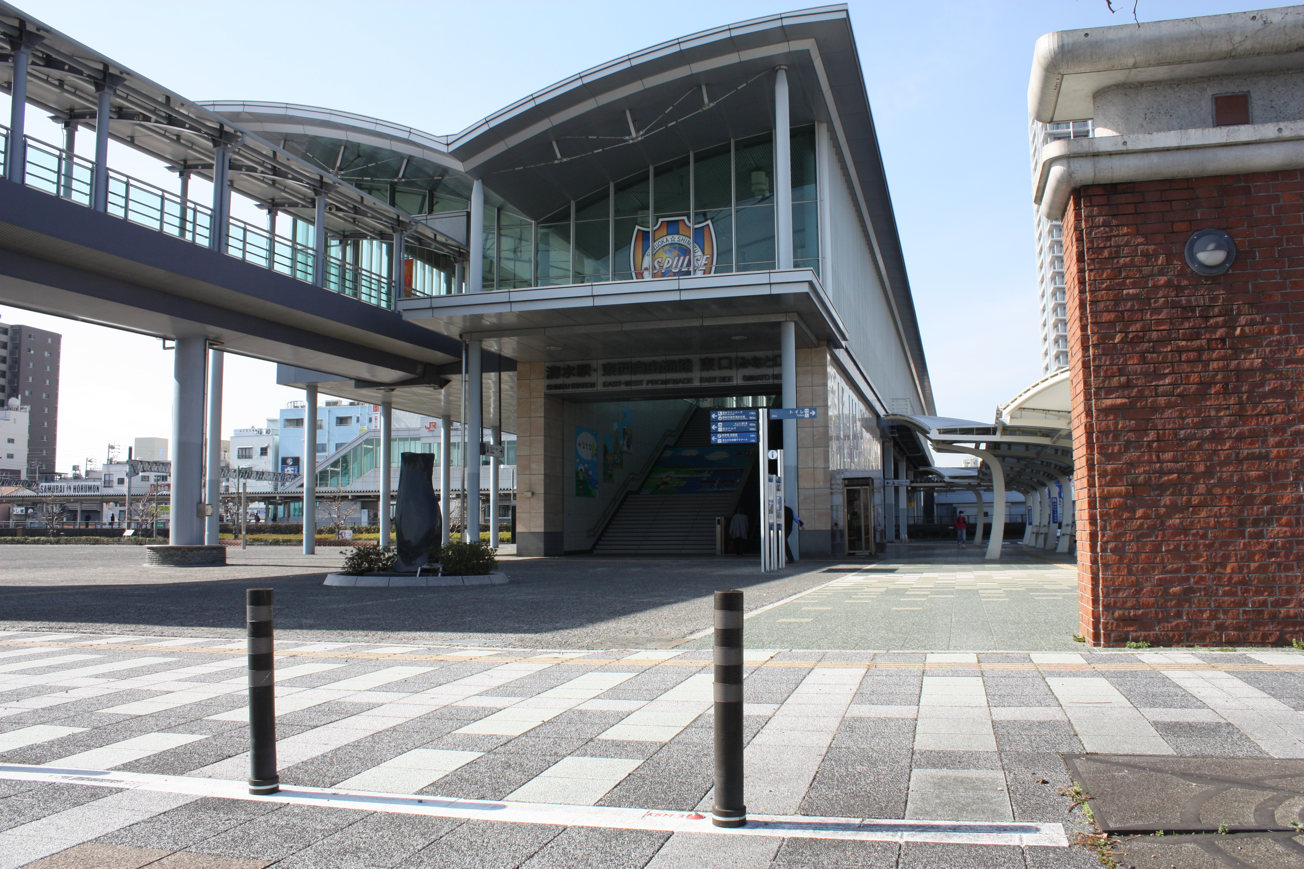 清水駅 東口 外観